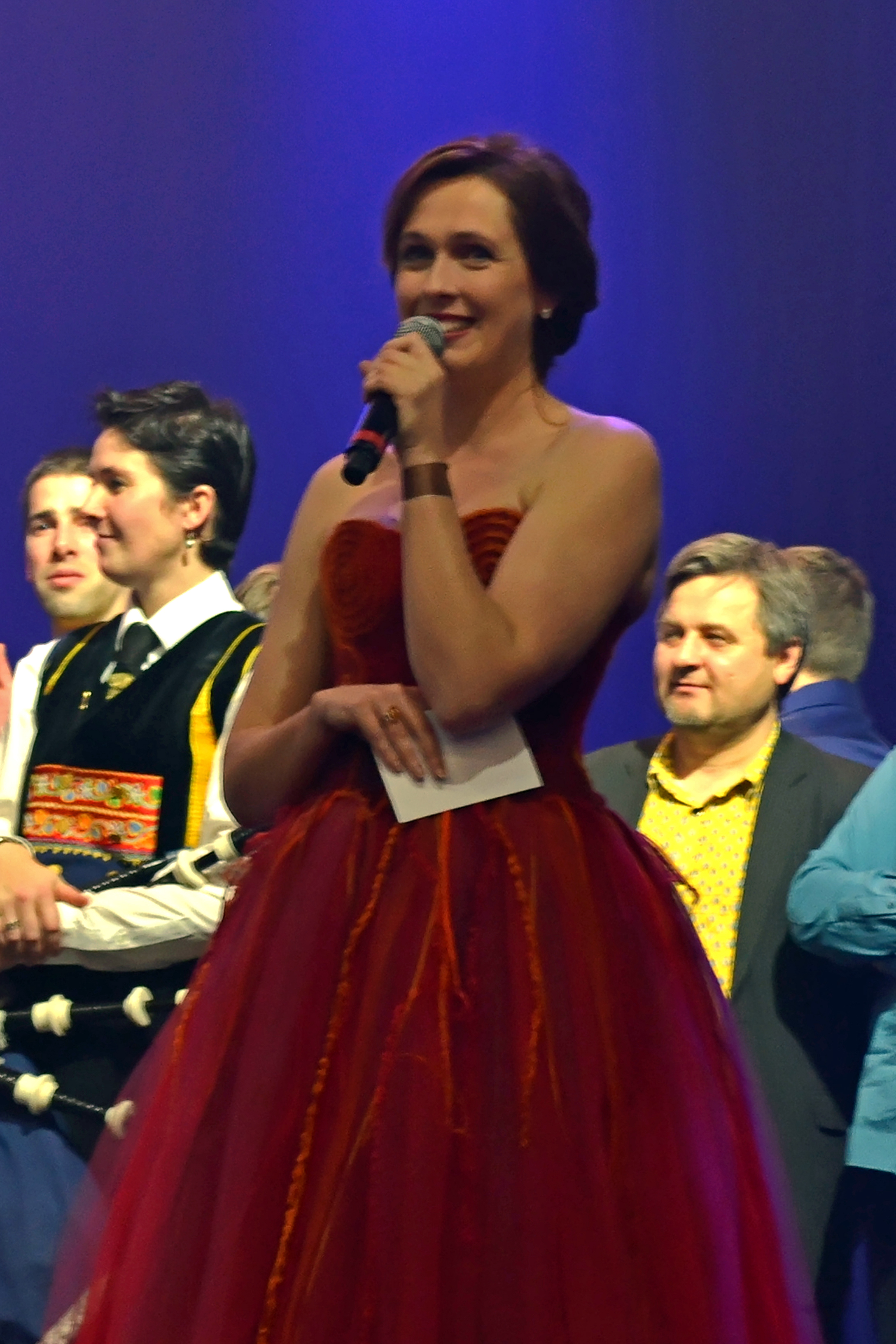 Présentation de La Nuit de la Bretagne par Goulwena an Henaff à Morlaix le 11 janvier 2014.